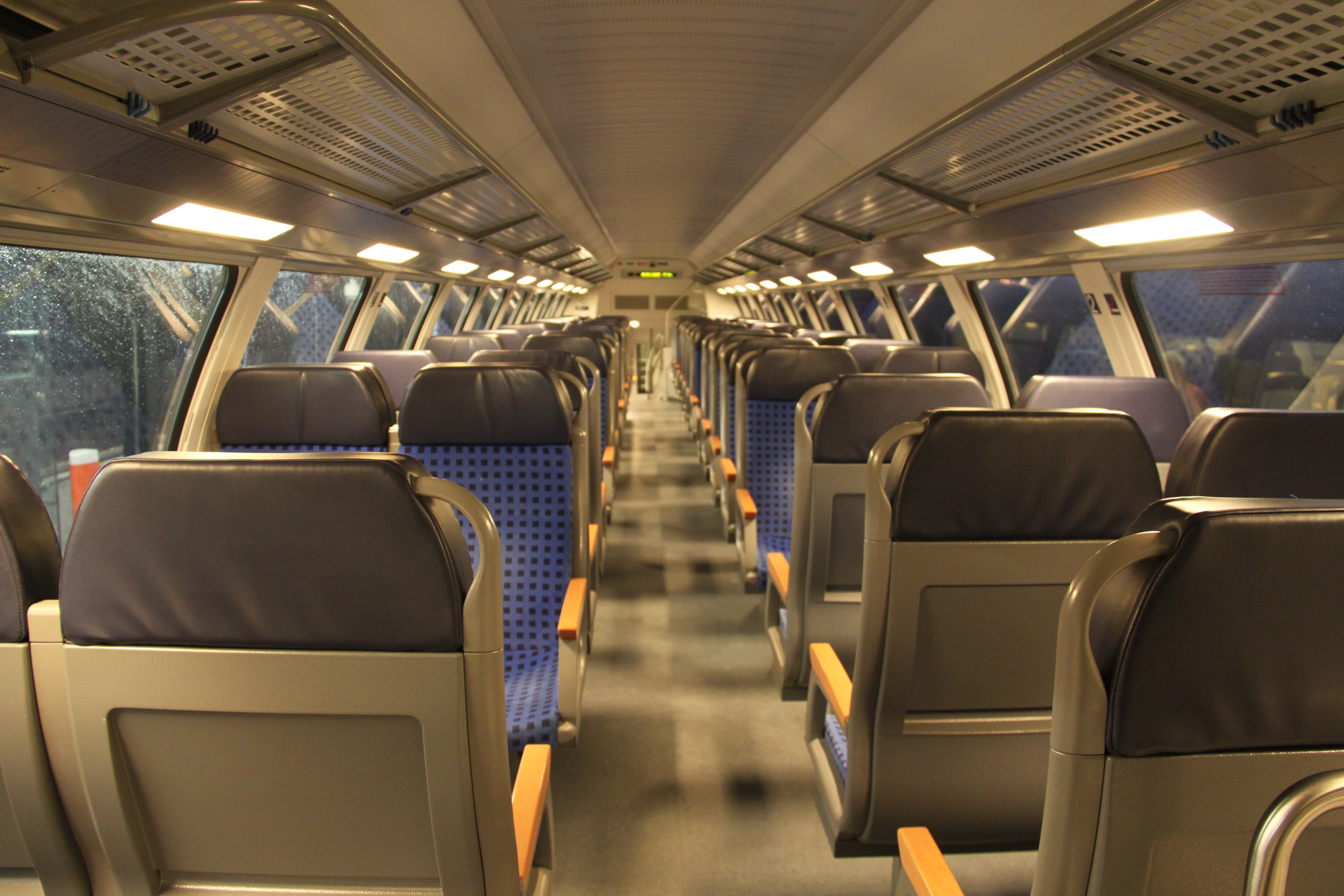 Interieur CFL Dosto tweede klasse